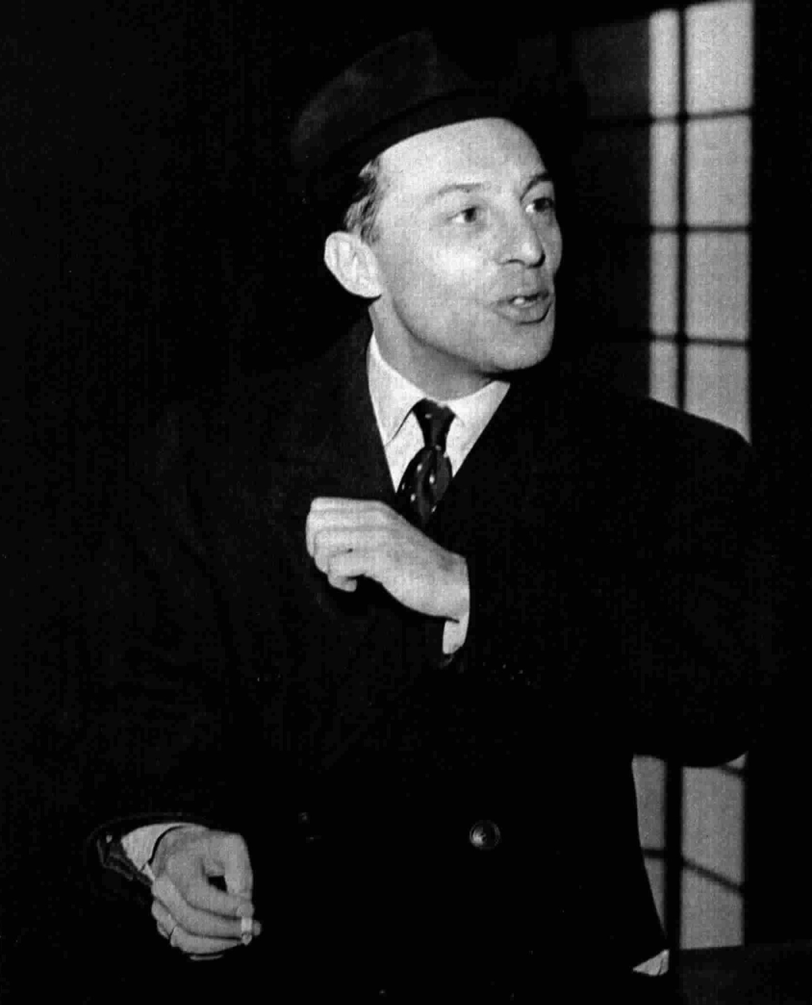 Leo Longanesi, editore e giornalista italiano.